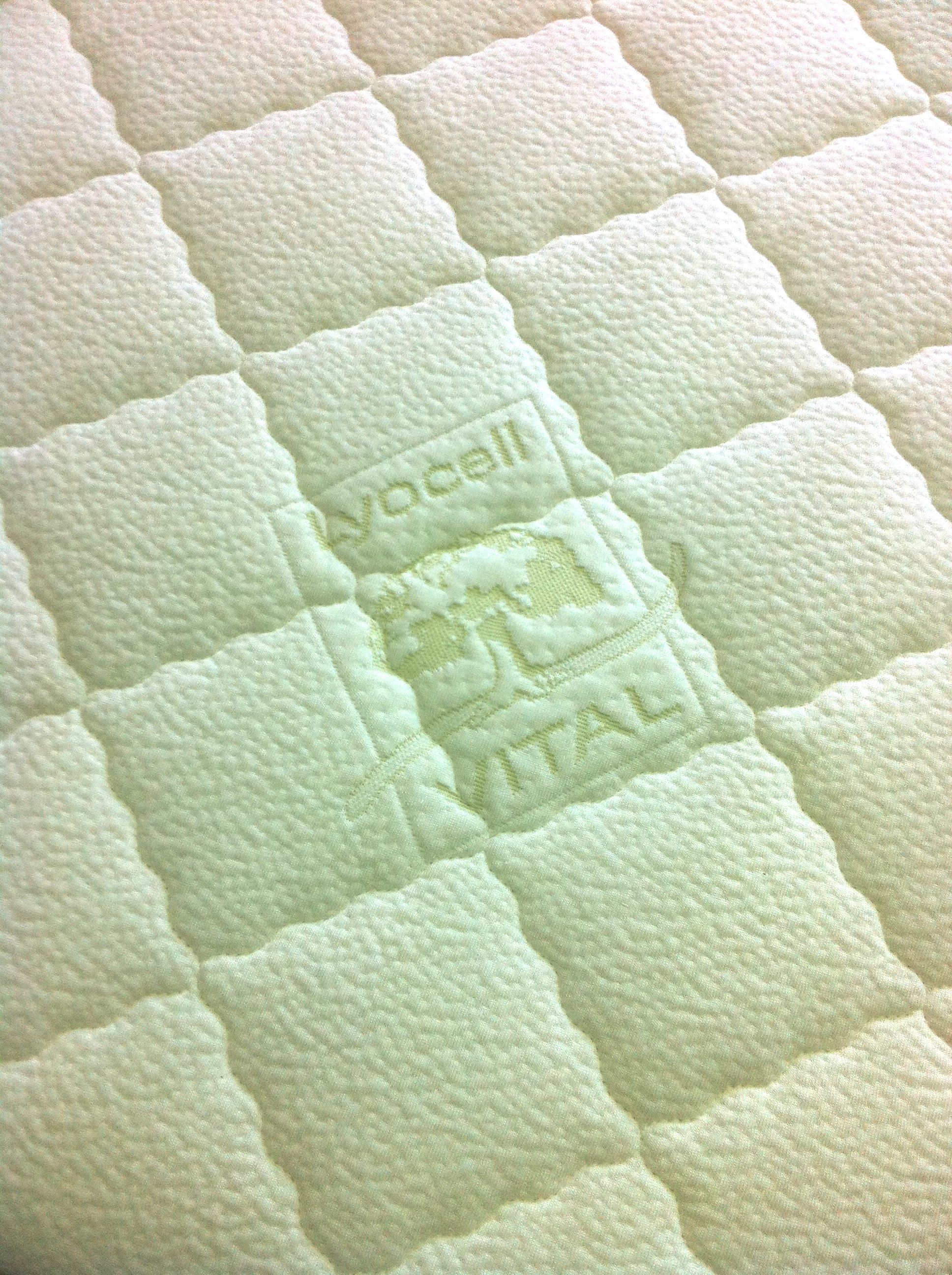 Ткань с волкнами Lyocell в чехле матраса.